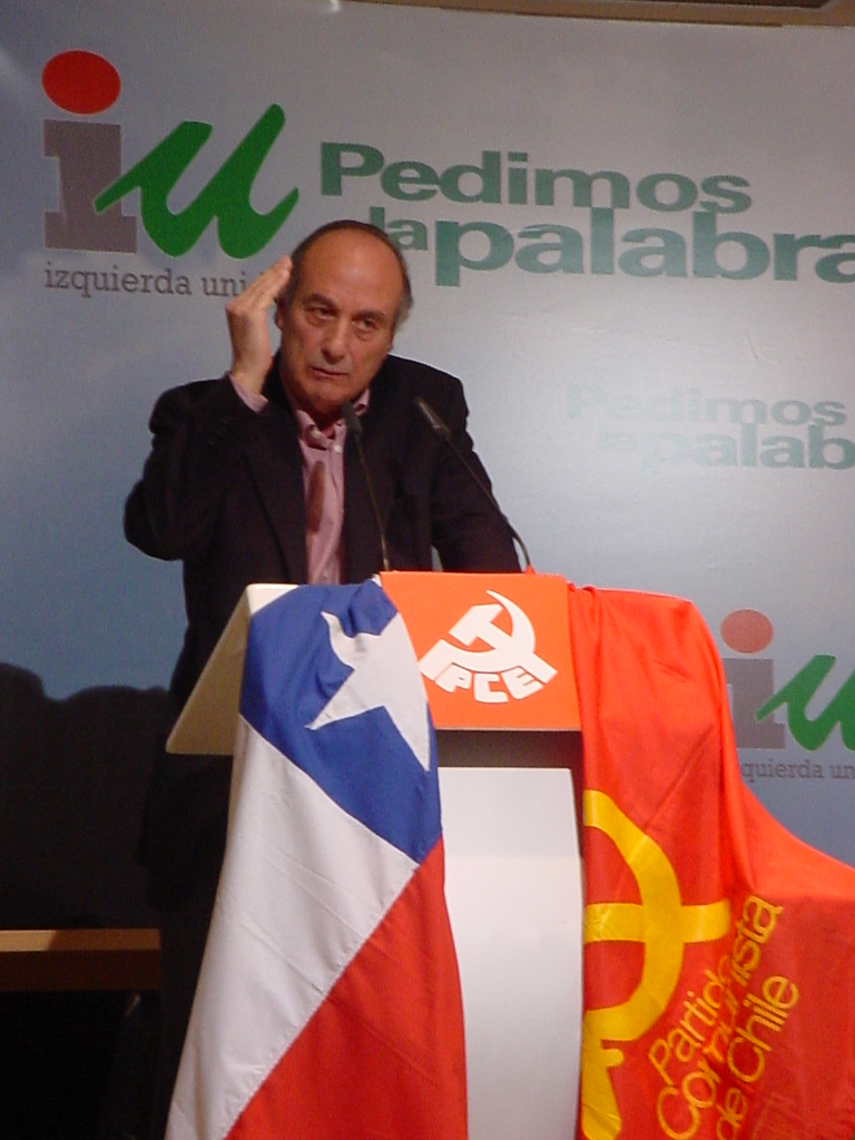 Paco Frutos en la sede de Izquierda Unida el 2005.